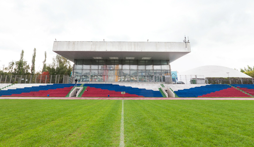 ФОК РУДН